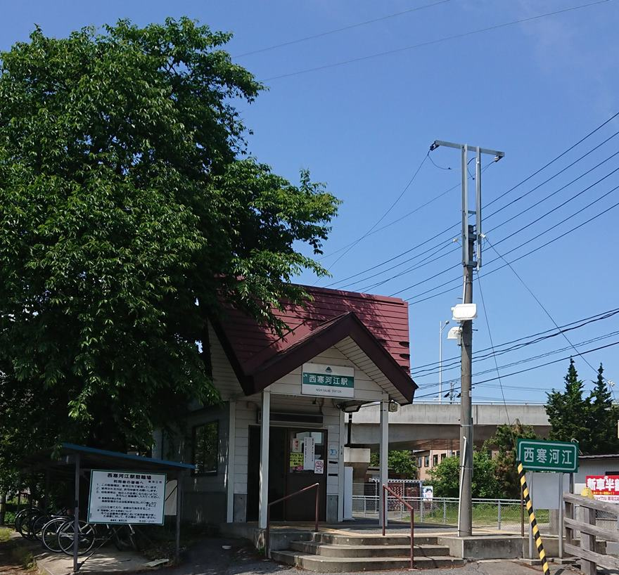 西寒河江駅